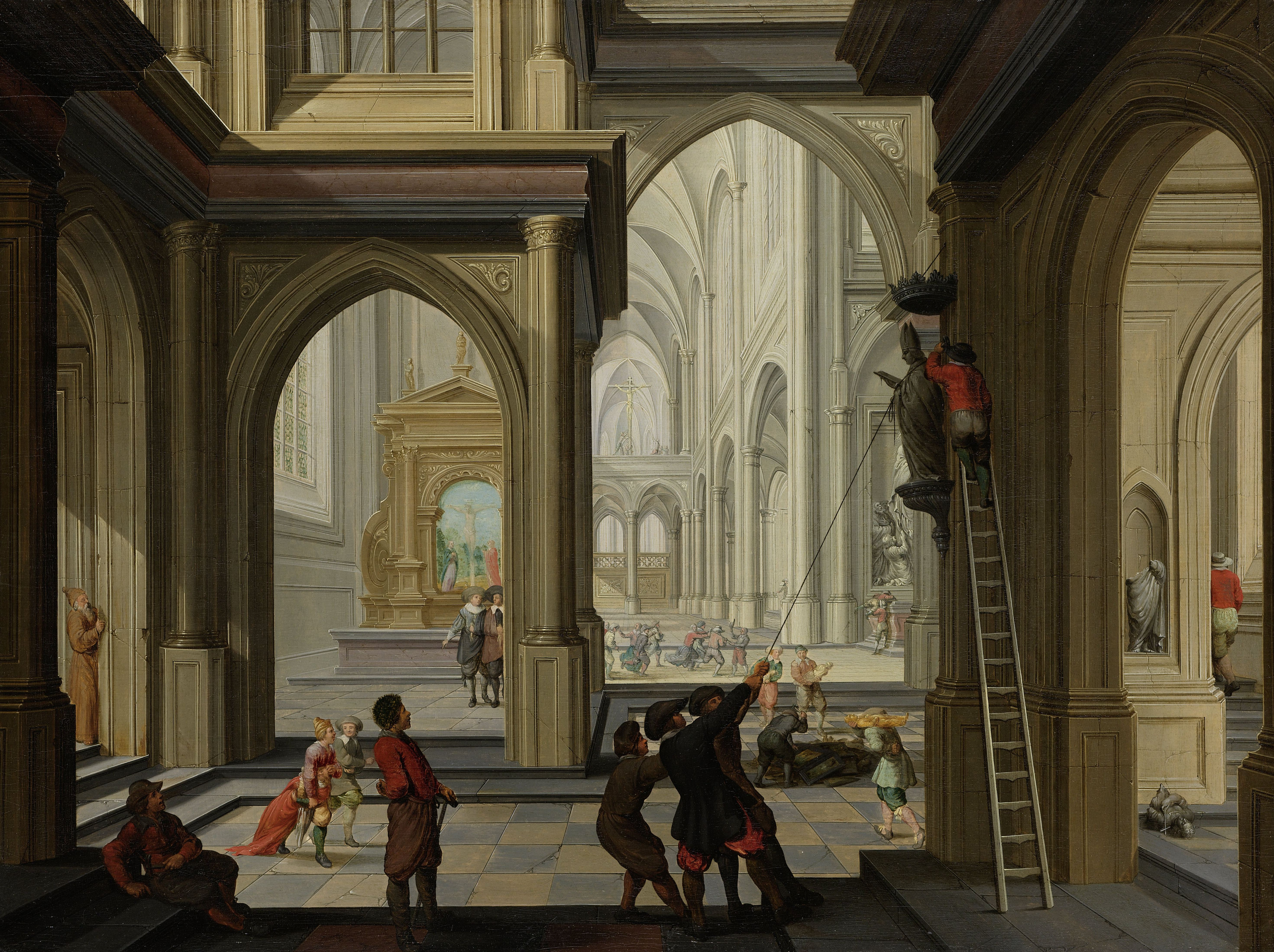 Verbeelding van een beeldenstorm in een kerk. In een kerkinterieur worden heiligenbeelden van hun sokkels getrokken en grafstenen vernield. Het dramatisch tafereel wordt uiterst links vanachter een pijler gadegeslagen door een clericus in habijt. Het interieur gaat niet terug op een bestaand bouwwerk, maar werd door Van Delen zorgvuldig geconstrueerd. De nauwgezette toepassing van het centrale perspectief, waarbij alle lijnen samenkomen in één verdwijnpunt, beheerst de voorstelling. In de opbouw van de compositie verleende Van Delen een grote rol aan de werking van het licht, dat wonderwel vanuit het noorden het gebouw binnenvalt.; Dirck van Delen (1604–1671), olieverf op paneel, 1630